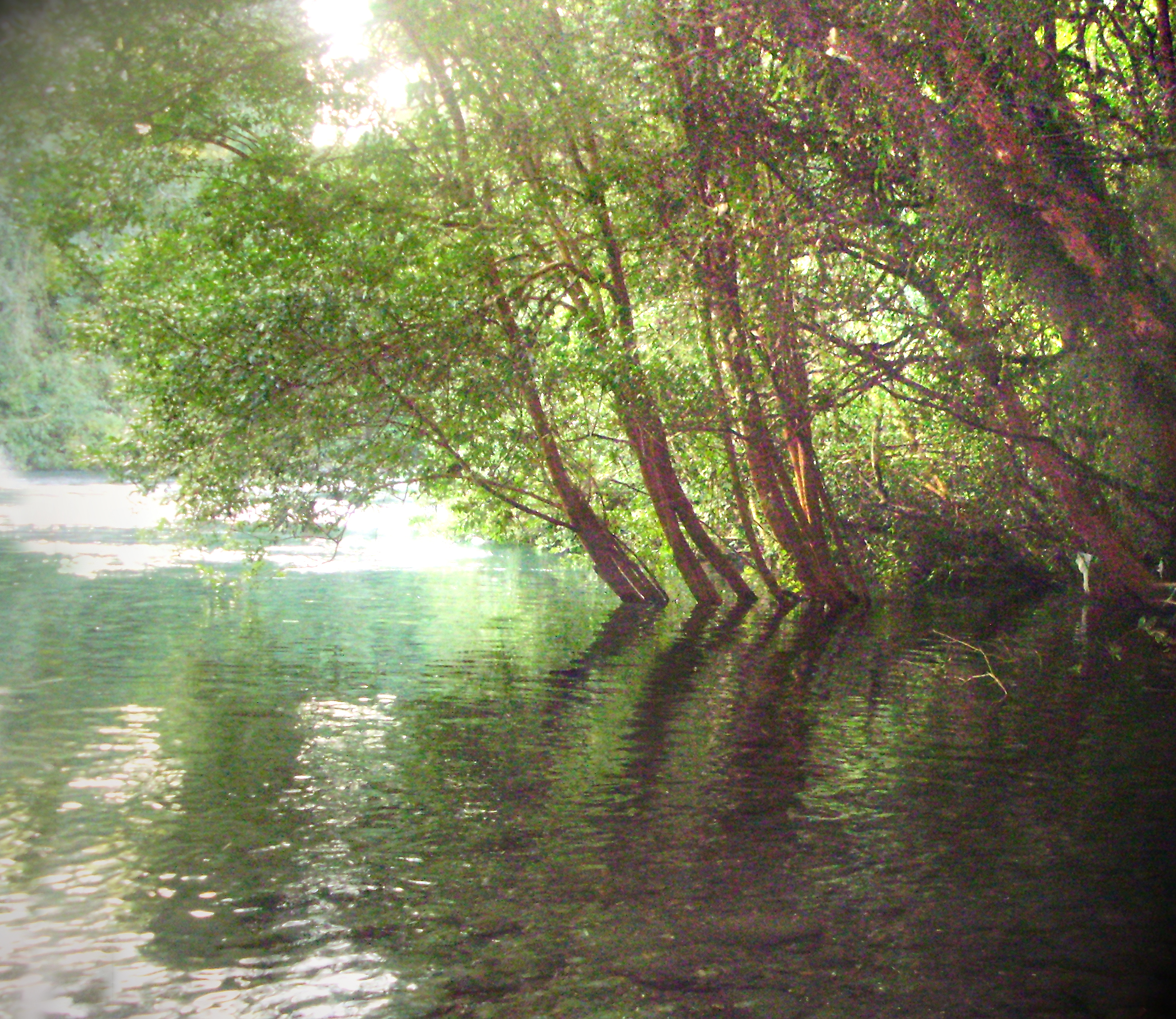 El río Pilmaiquén cruza un bosque de arrayanes (Luma apiculata) en Los Lagos, Chile.